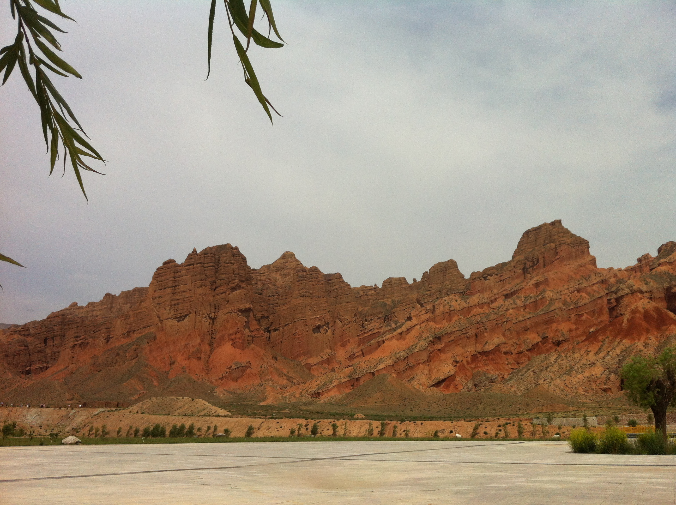 丹霞地貌，七彩峰叢